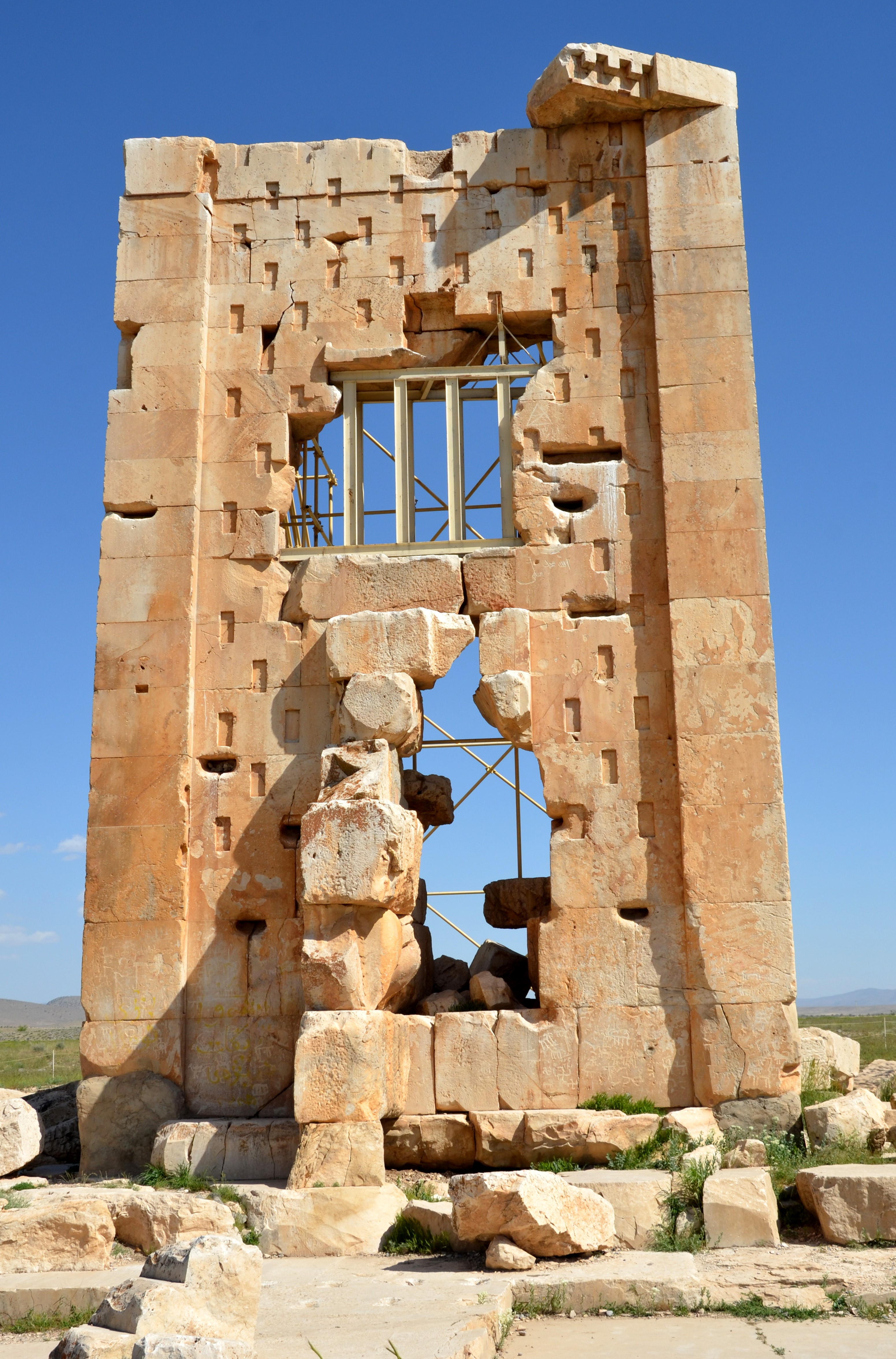 Pasargad - Soleyman Prison